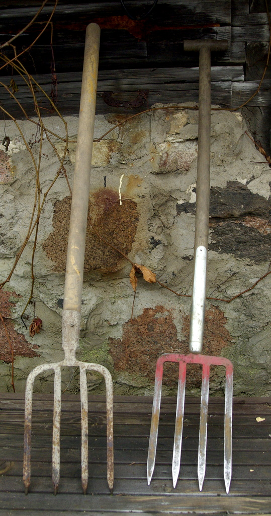 Aiakaevamishargid